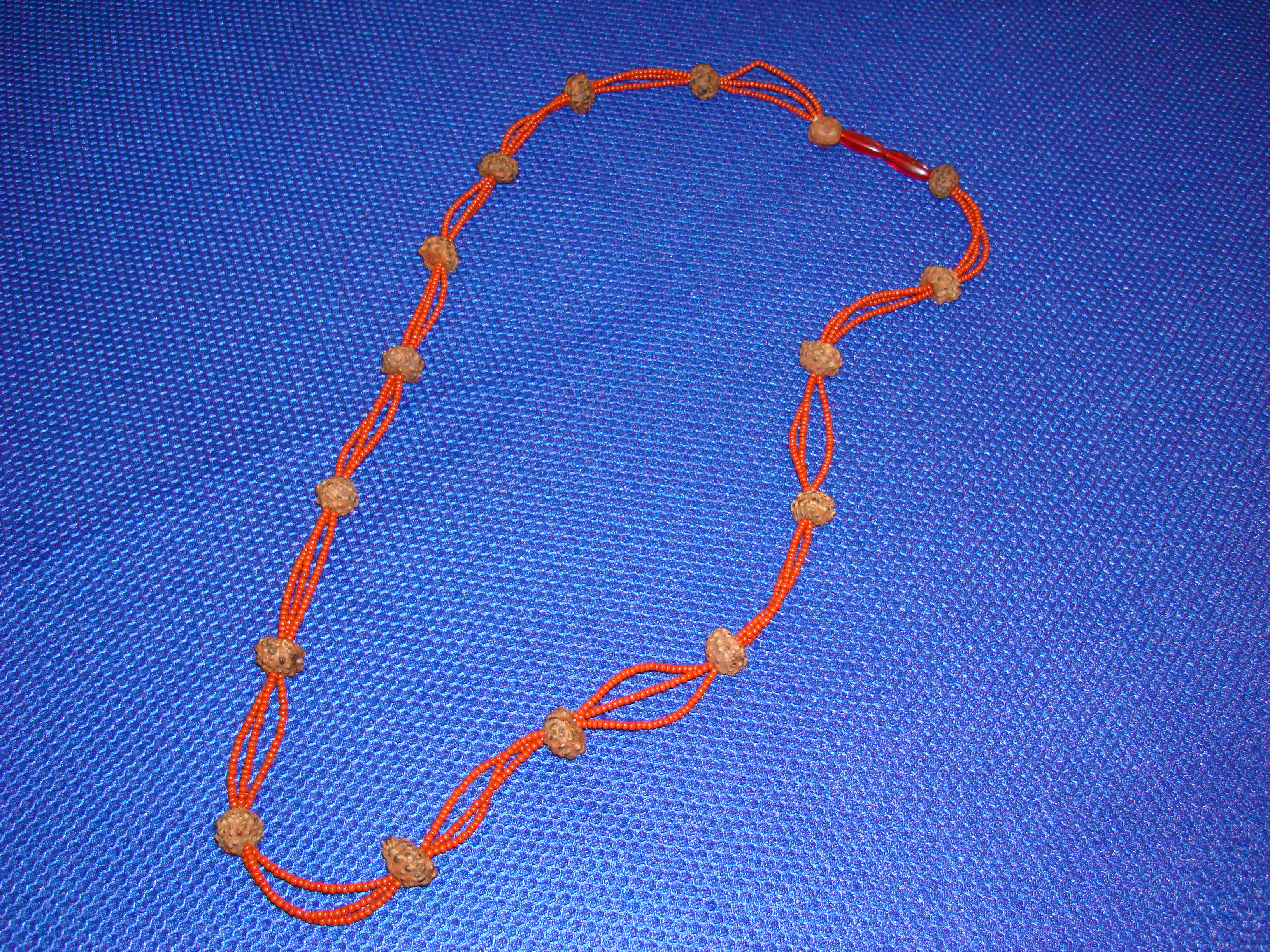 Runjebe Benin, Savalu, Africa